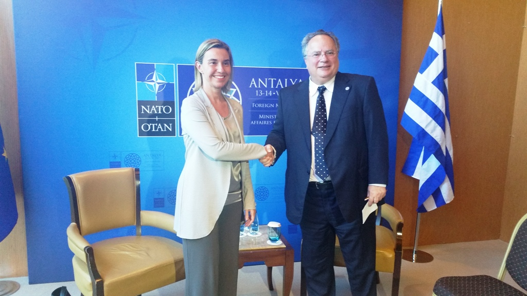 Συνάντηση Υπουργού Εξωτερικών Νίκου Κοτζιά με την Ύπατη Εκπρόσωπο της Ευρωπαϊκής Ένωσης για την Εξωτερική Πολιτική και την Πολιτική Ασφάλειας, Federica Mogherini, στο περιθώριο της Διάσκεψης των Υπουργών Εξωτερικών του ΝΑΤΟ στην Αττάλεια, 14.5.2015